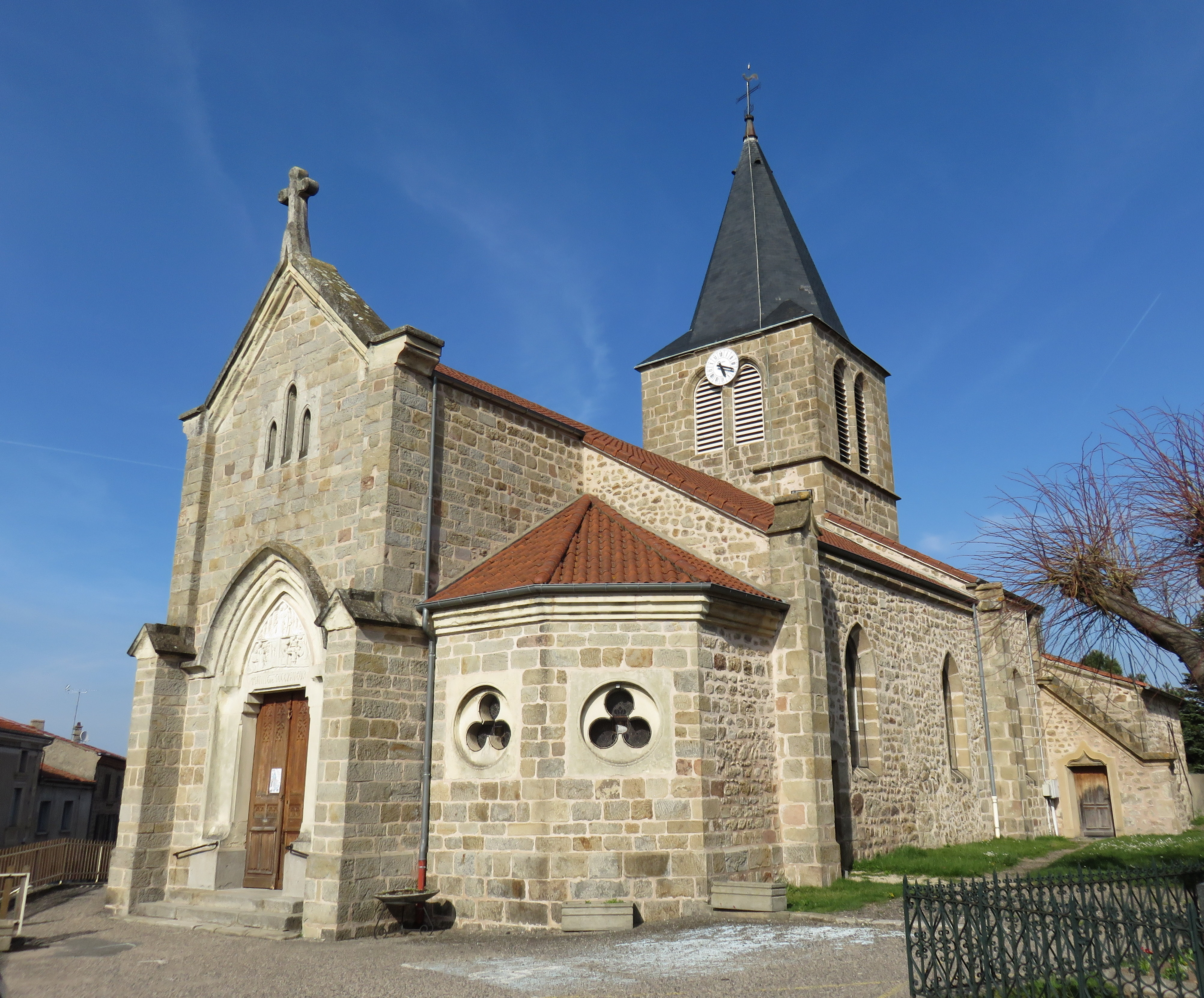 Église de Soleymieux, dans le département de la Loire.